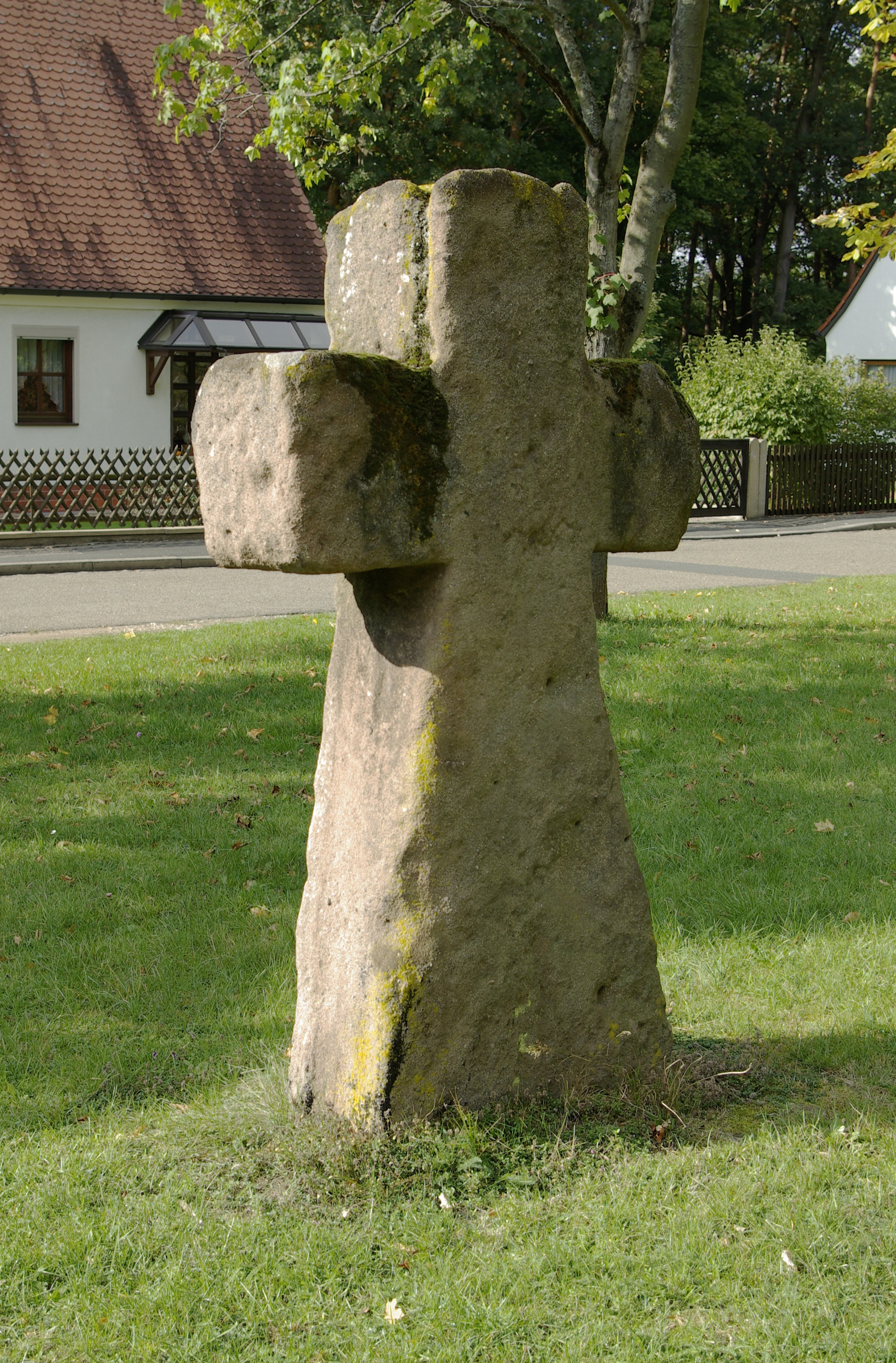 Der mittelalterliche Kreuzstein im Erlanger Stadtteil Eltersdorf, Rückseite